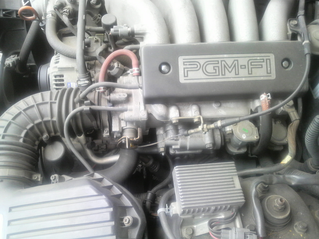 HONDA G20A Engine Right View